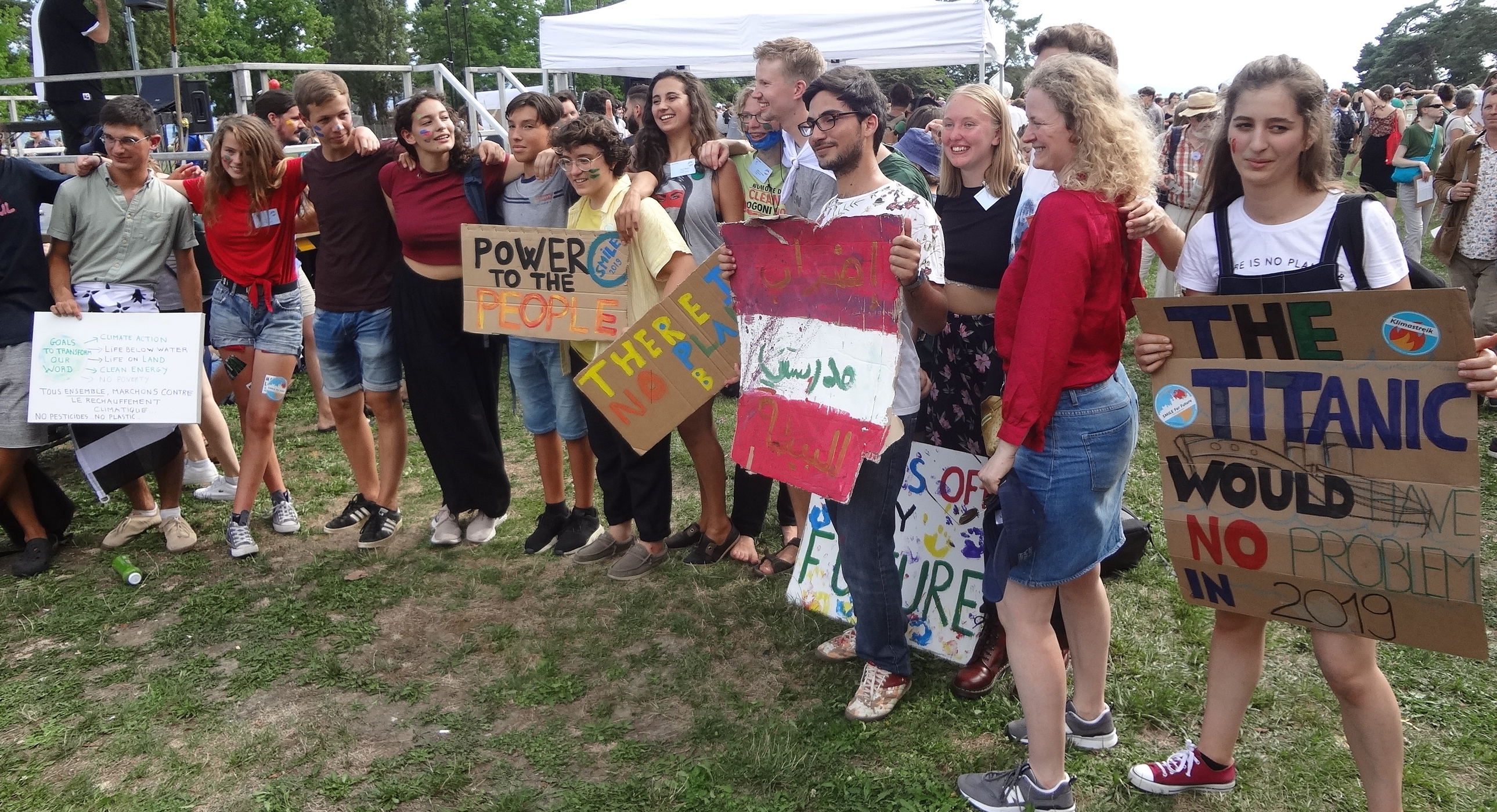 Manifestation pour le climat, Lausanne. Dernier jour de la rencontre du mouvement Fridays for Future (vendredis pour l'avenir) réunissant des membres de plus de 37 pays lors du Summer Meeting in Lausanne Europe, ou SMILE for Future 5-9 août 2019. Rassemblement à Vidy.